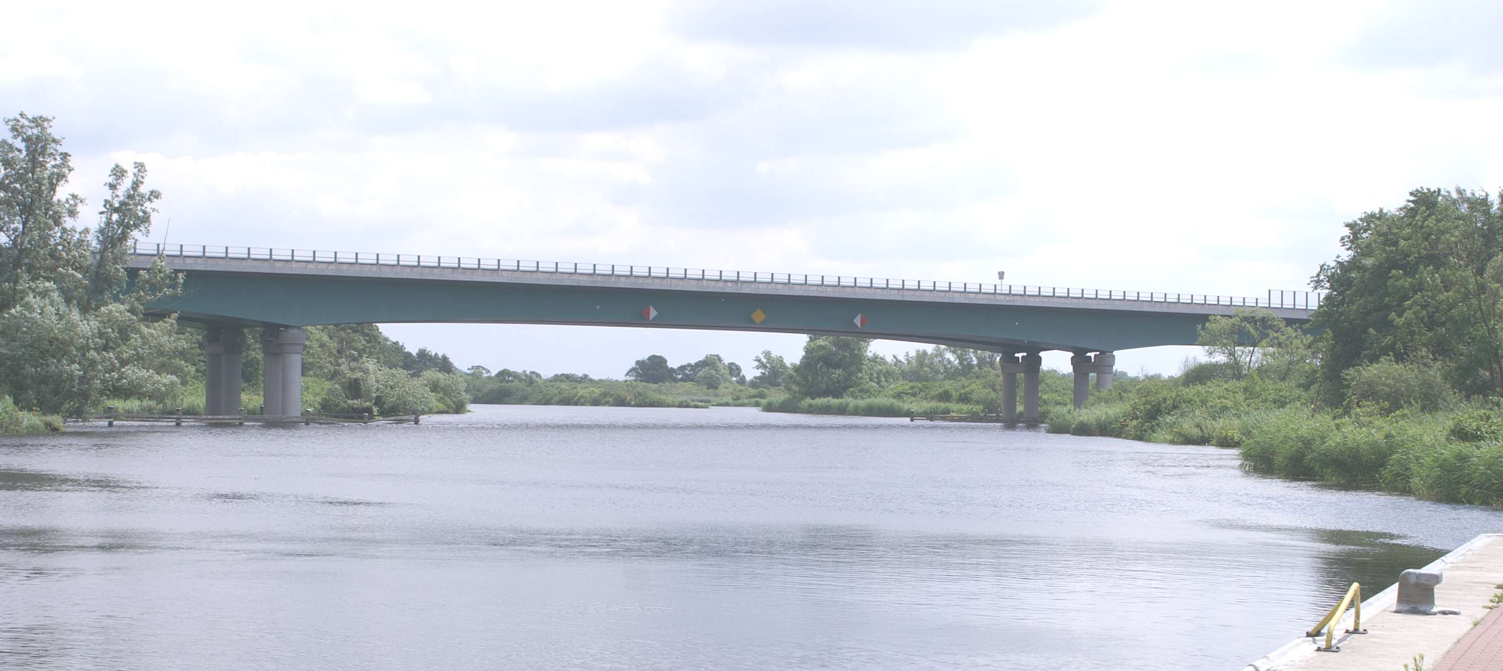 Peenebrücke Jarmen - vom Jarmener Hafen aus gesehen